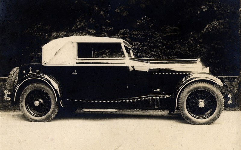 Hotchkiss carrossée par Pourtout